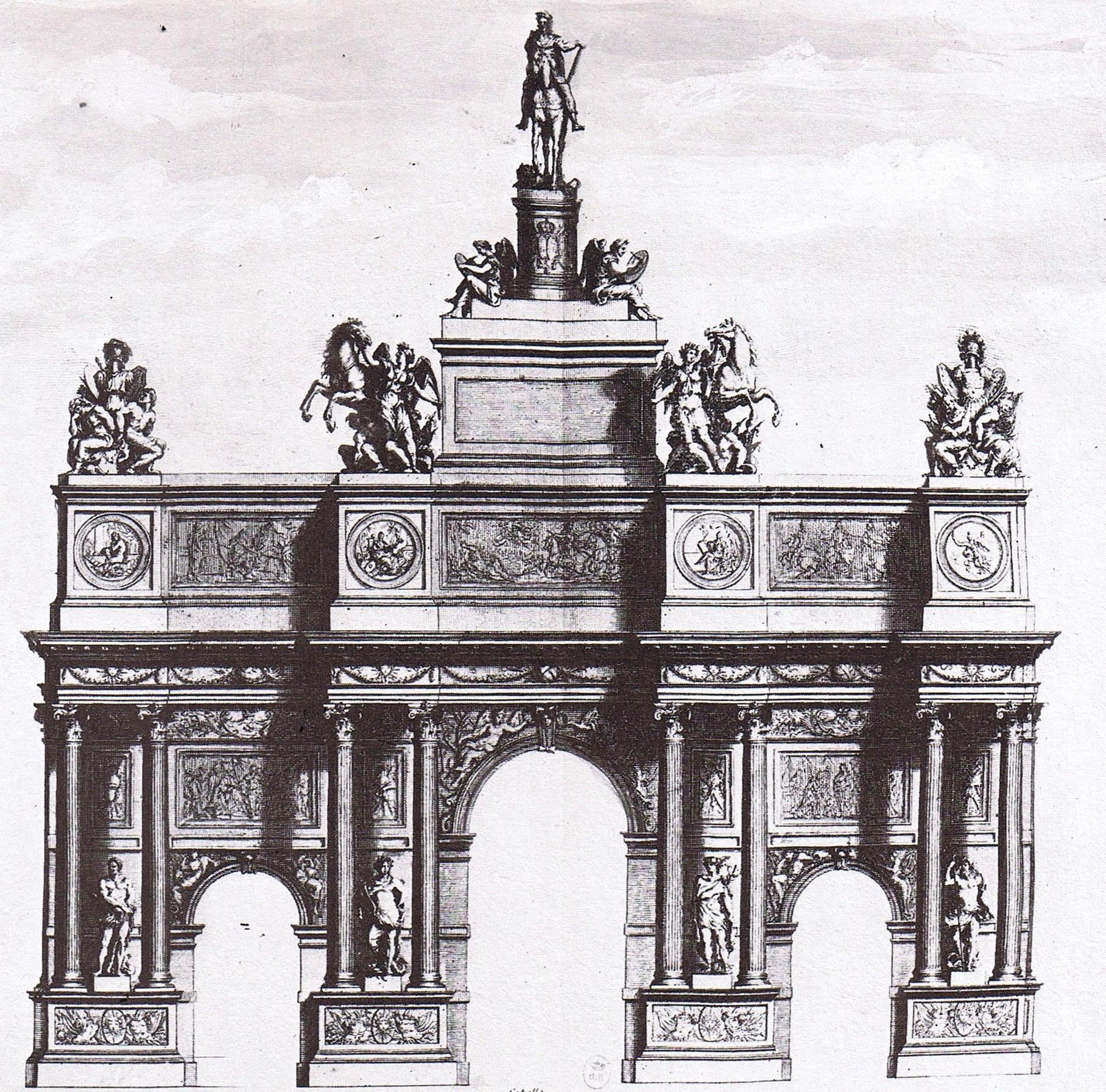 Projet d'arc de triomphe pour la place du Trône (aujourd'hui place de la Nation).